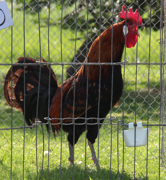 Bergse kraaier bij een hanenkraaiwedstrijd